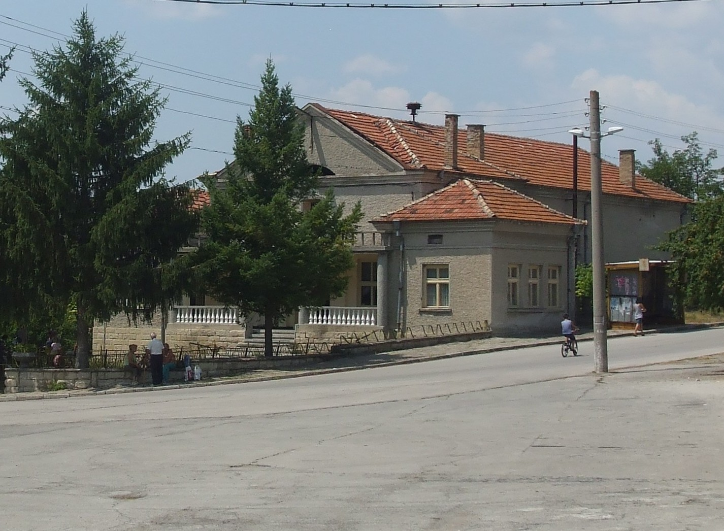 Сградата на читалището в село Съединение, община Търговища